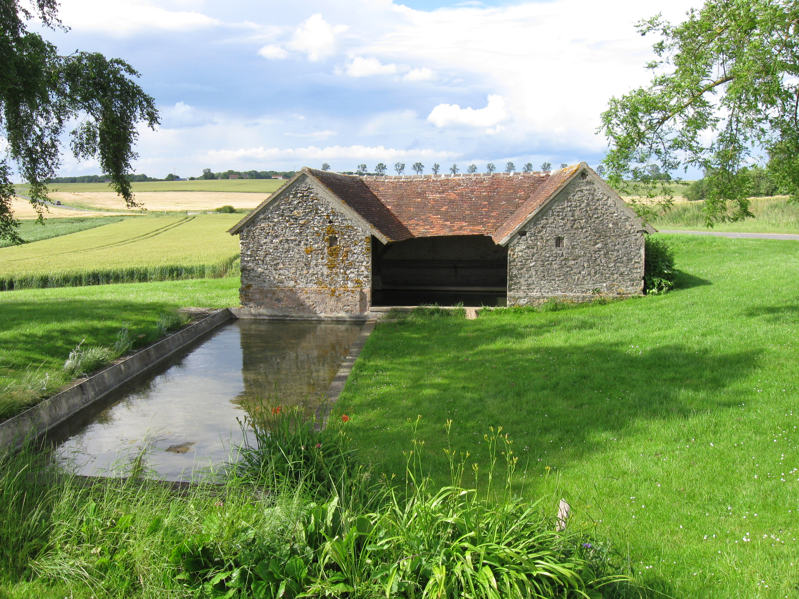 Lavoir de Bannost. (Seine-et-Marne, région Île-de-France).